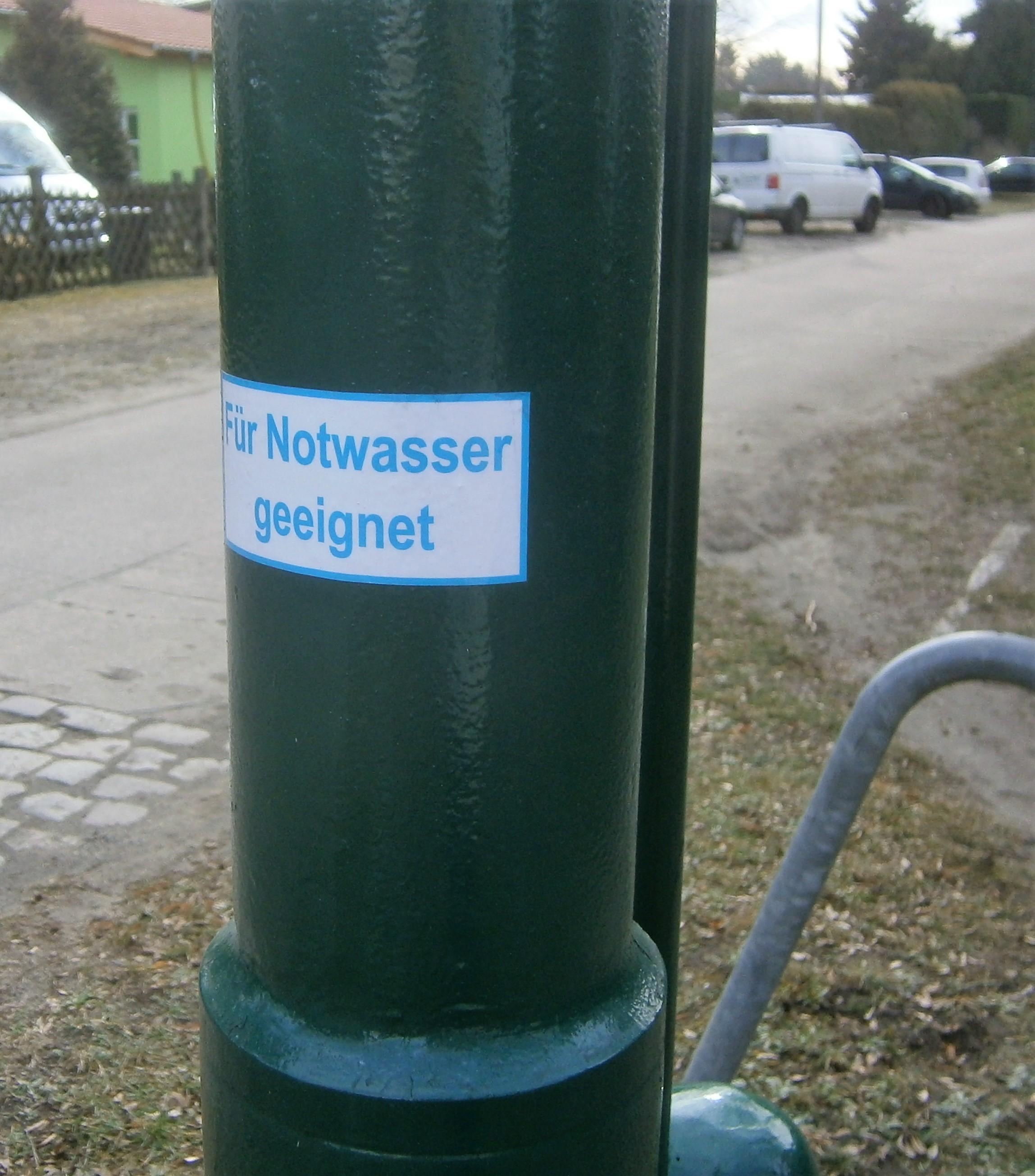 Der Köpenickeer Straßenbrunnen in der Rahnsdorfer Püttbergesiedlung steht an der Straßenecke Fangschleuser/ Püttbergeweg auf der dreieckigen Rasenfläche südwestlich der Fangschleuser Straße zu.[1] Der Brunnenfuß über einen Zwischenflansch am Sockelrohr befestigt steht auf einer Betonplatte, in die auch der Straßeneinlass eingebracht sit. An beiden Seiten der Platte ist der Brunnen gegen Anfahren durch Kraftfahrzeuge, die auf dem Rasenstreifen parken, geschützt. Der betriebsbereite Brunnen gibt zwar laut Schild kein Trinkwasser, aber es ist ein Schild "Für Notwasser geeignet" angebracht.